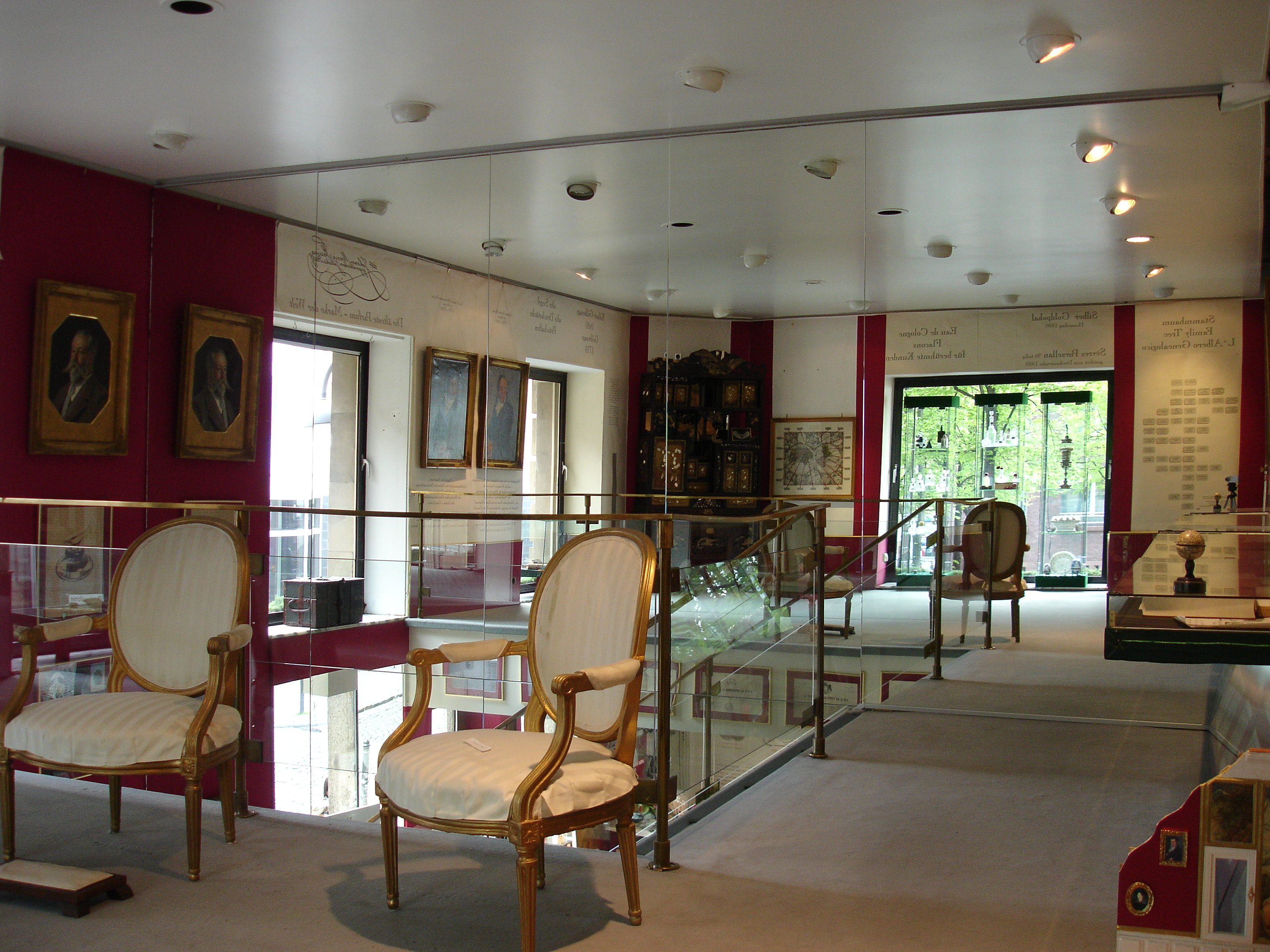 Duftmuseum belle etage